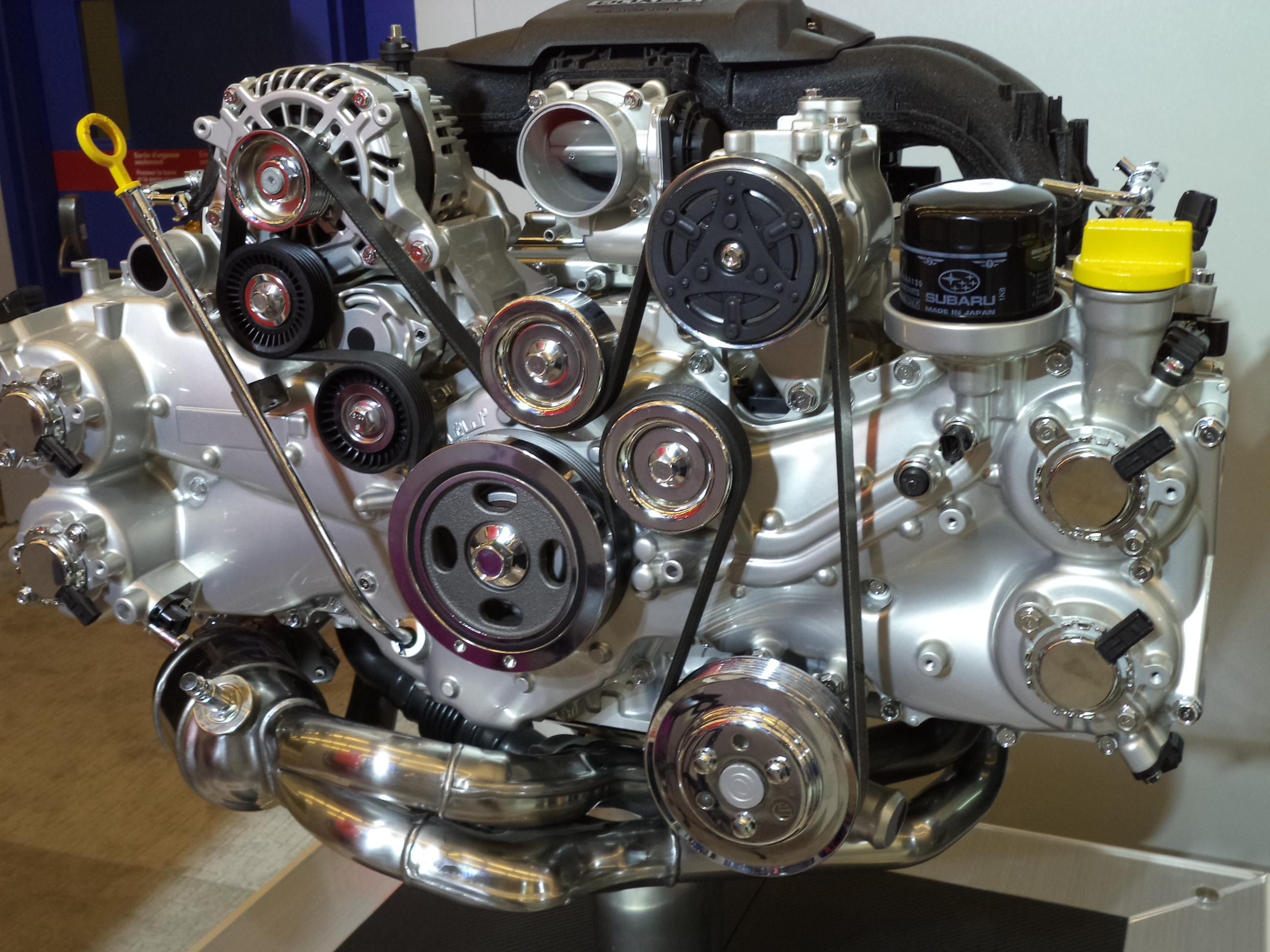 Subaru BRZ engine